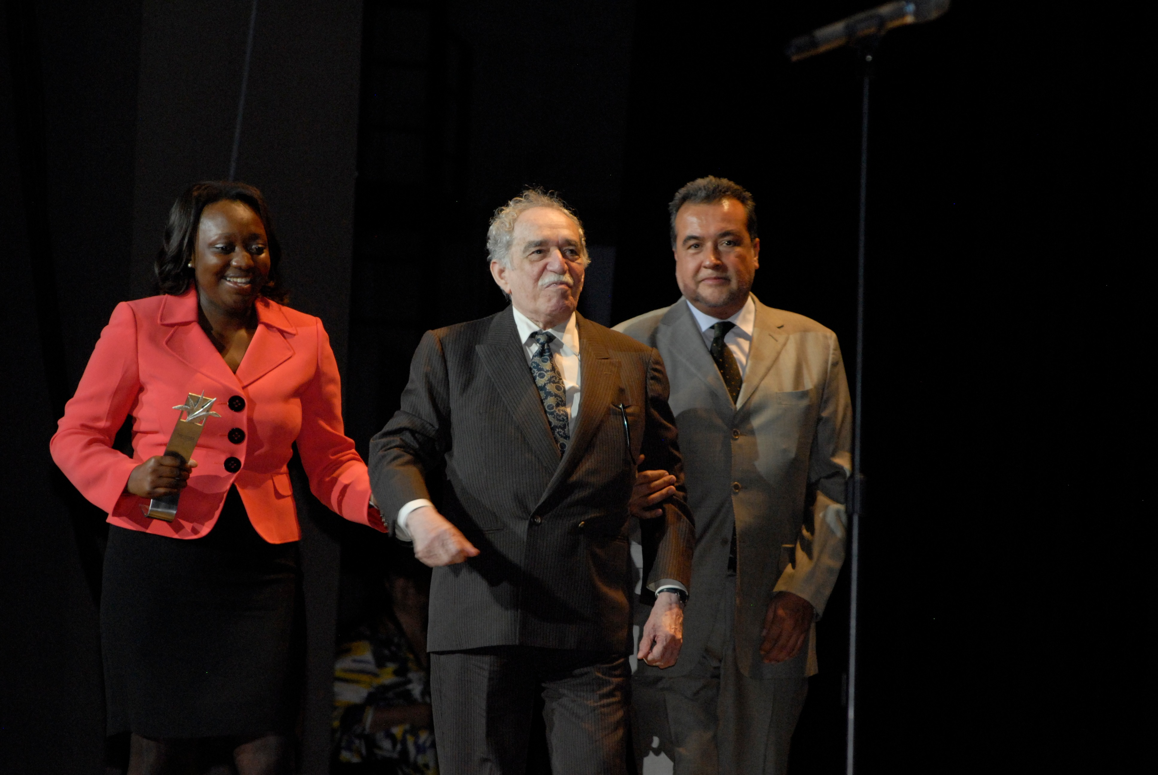 19/03/2009 La Ministra de Cultura de Colombia Paula Moreno y el escritor colombiano Gabriel García Márquez acompañado por el director del festival, fueron los encargados de entregar el Mayahuel de Plata a Víctor Gaviria